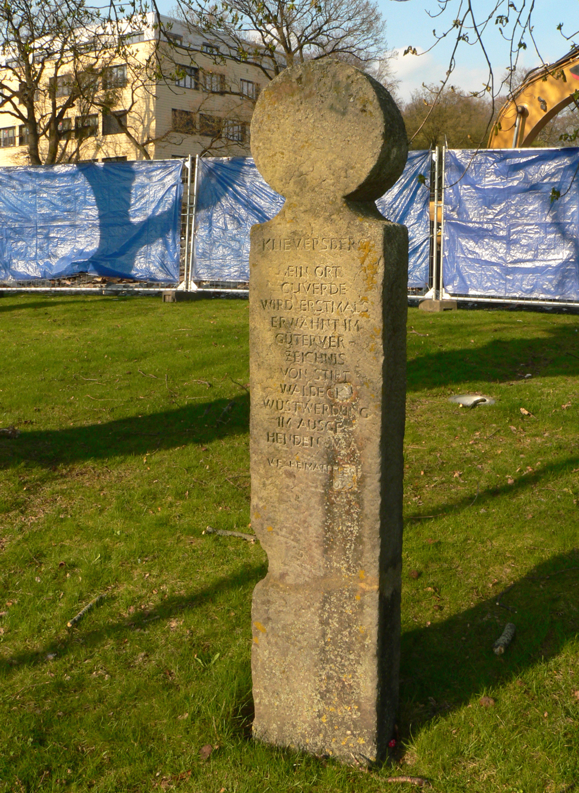 Gedenkstein für Cliverde auf dem Klieversberg, dahinter das Krankenhaus